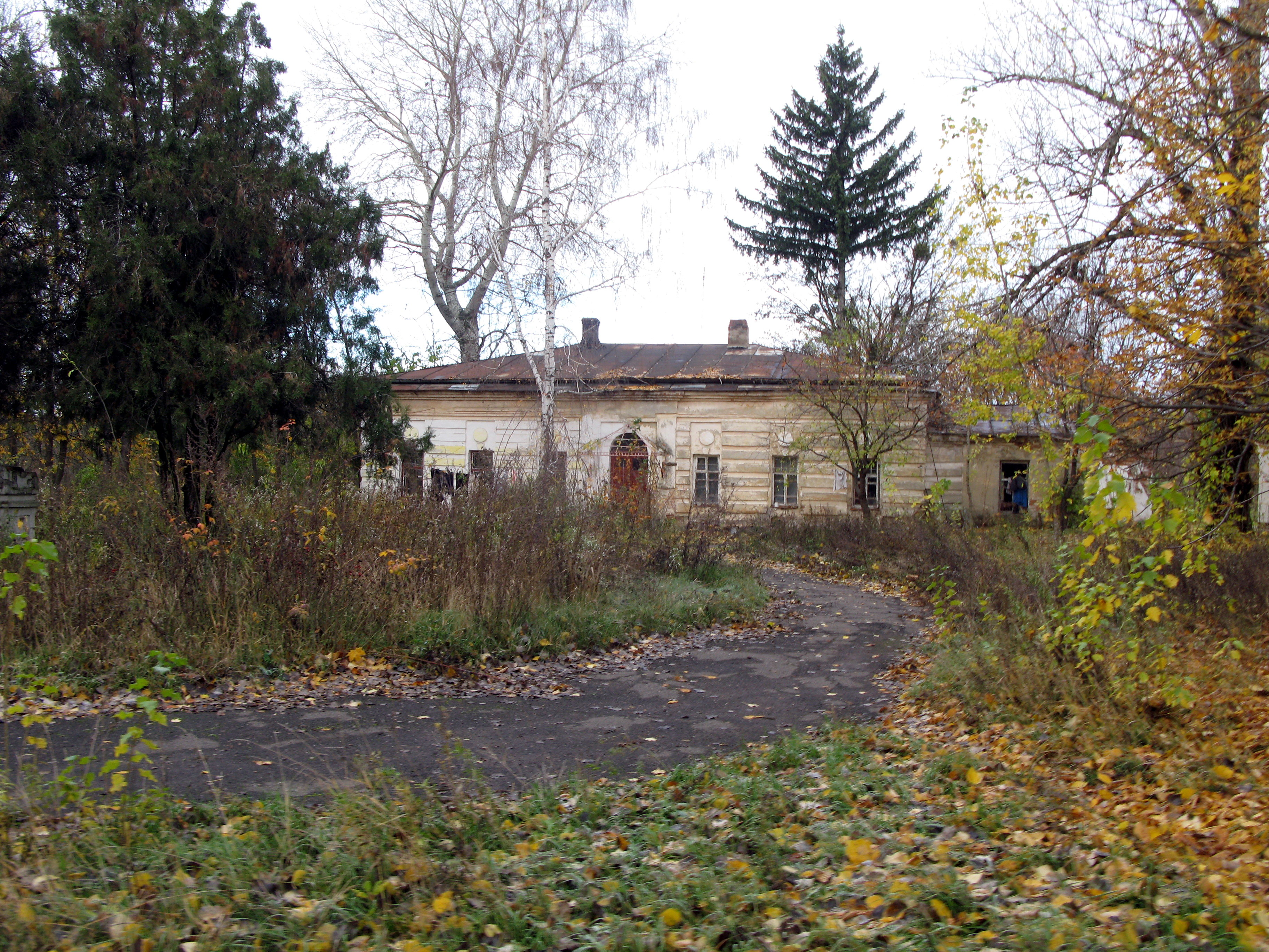 Флігель західний (мур.) (не використовується), Старий Мерчик